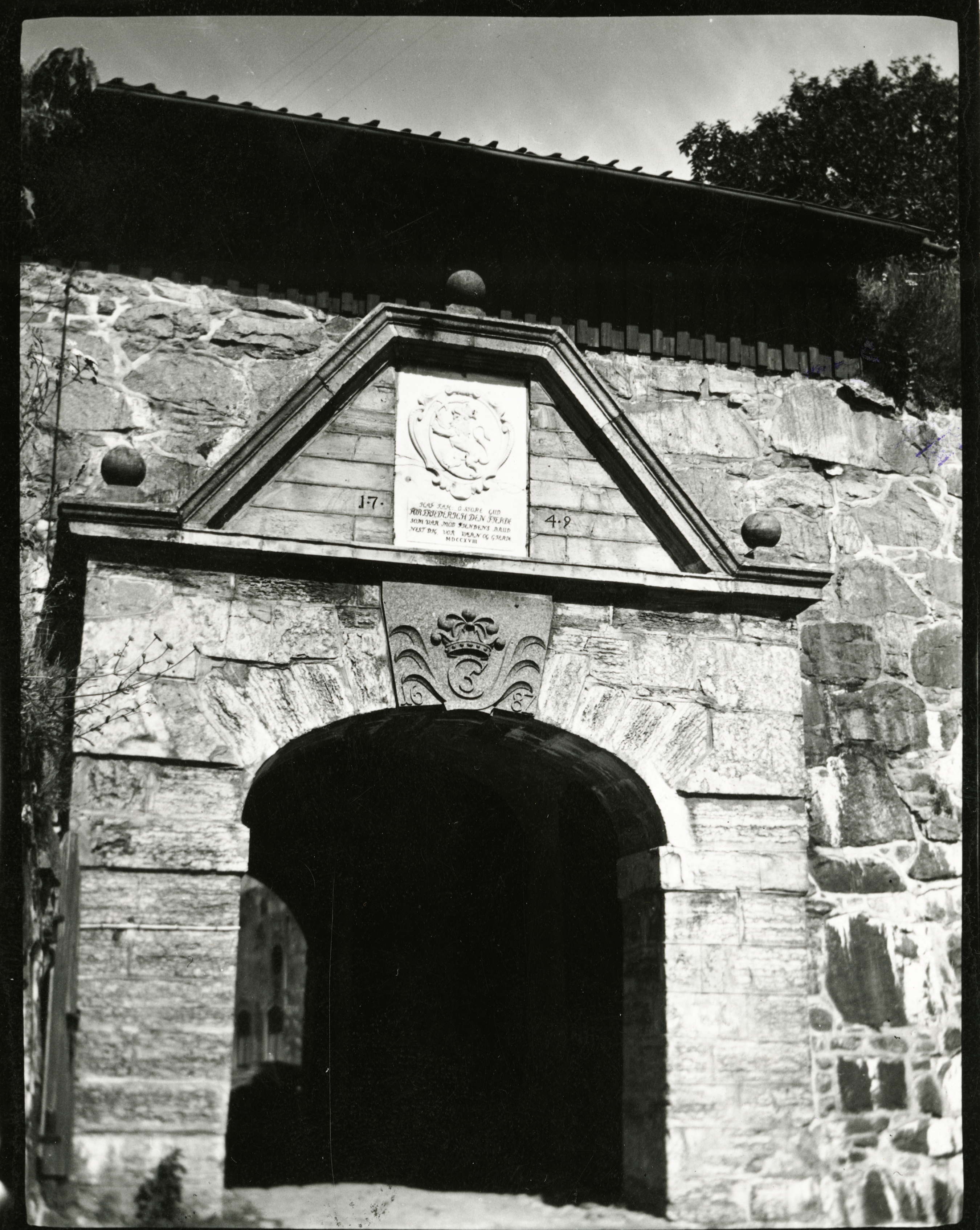 Fredriksten festning i Halden, Østfold Øvre-/Østre ravelin port, tenalieport.